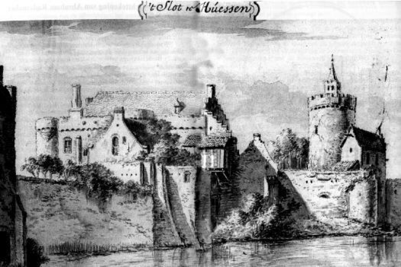 Oude prent Slot te Huissen